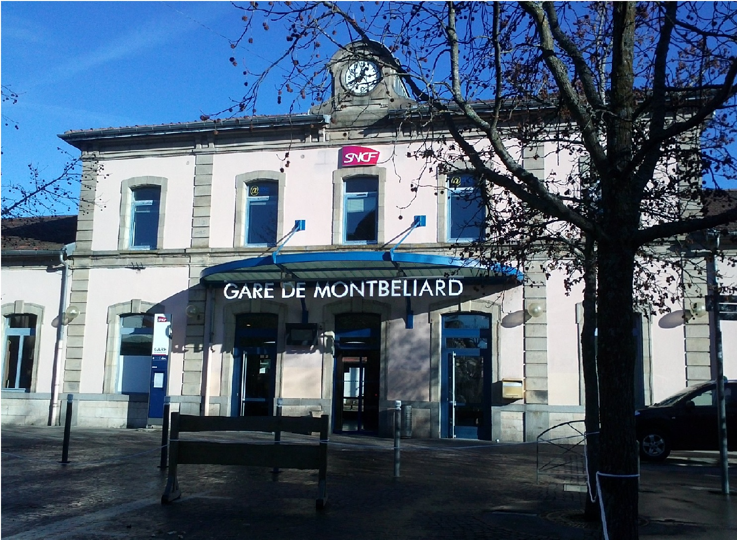 Gare de Montbéliard (2013)